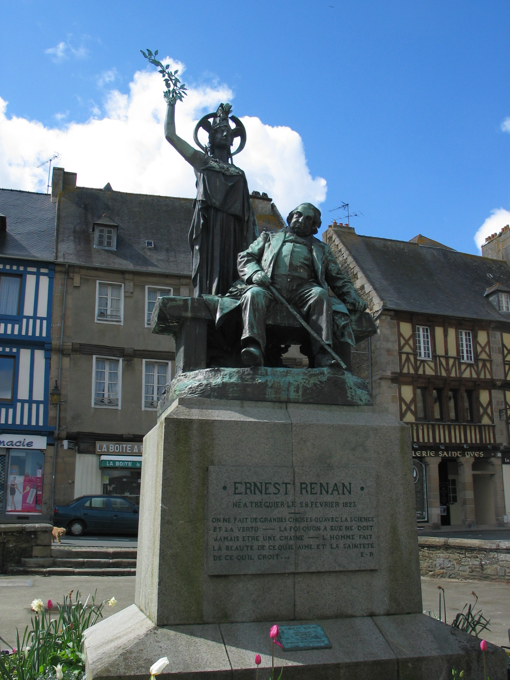 Monument dédié à Ernest Renan sur la place principale de Tréguier (Bretagne) Debout, Pallas Athéna. Monument érigé en 1903.